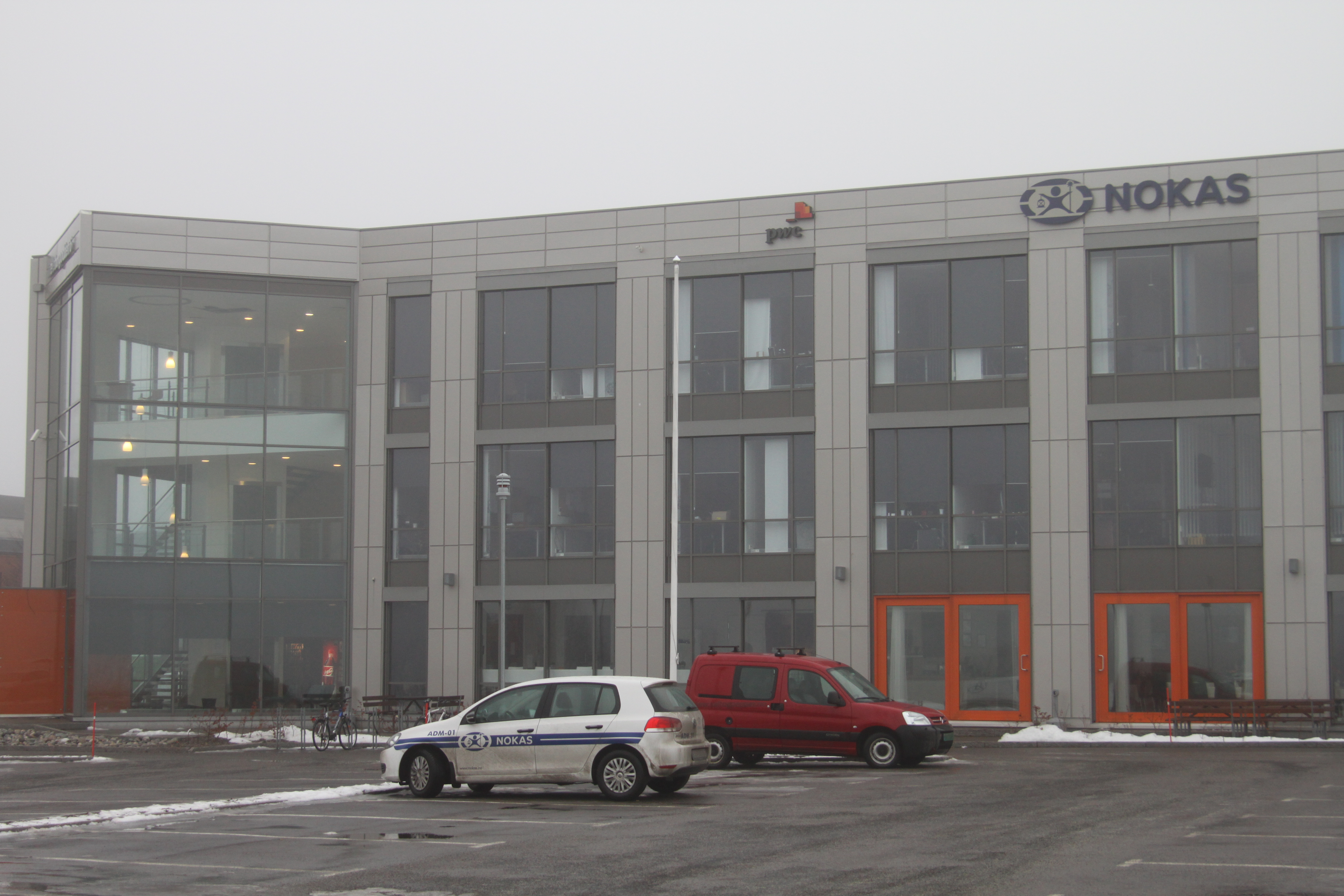 Hovedkontoret til NOKAS på Træleborgodden i Tønsberg